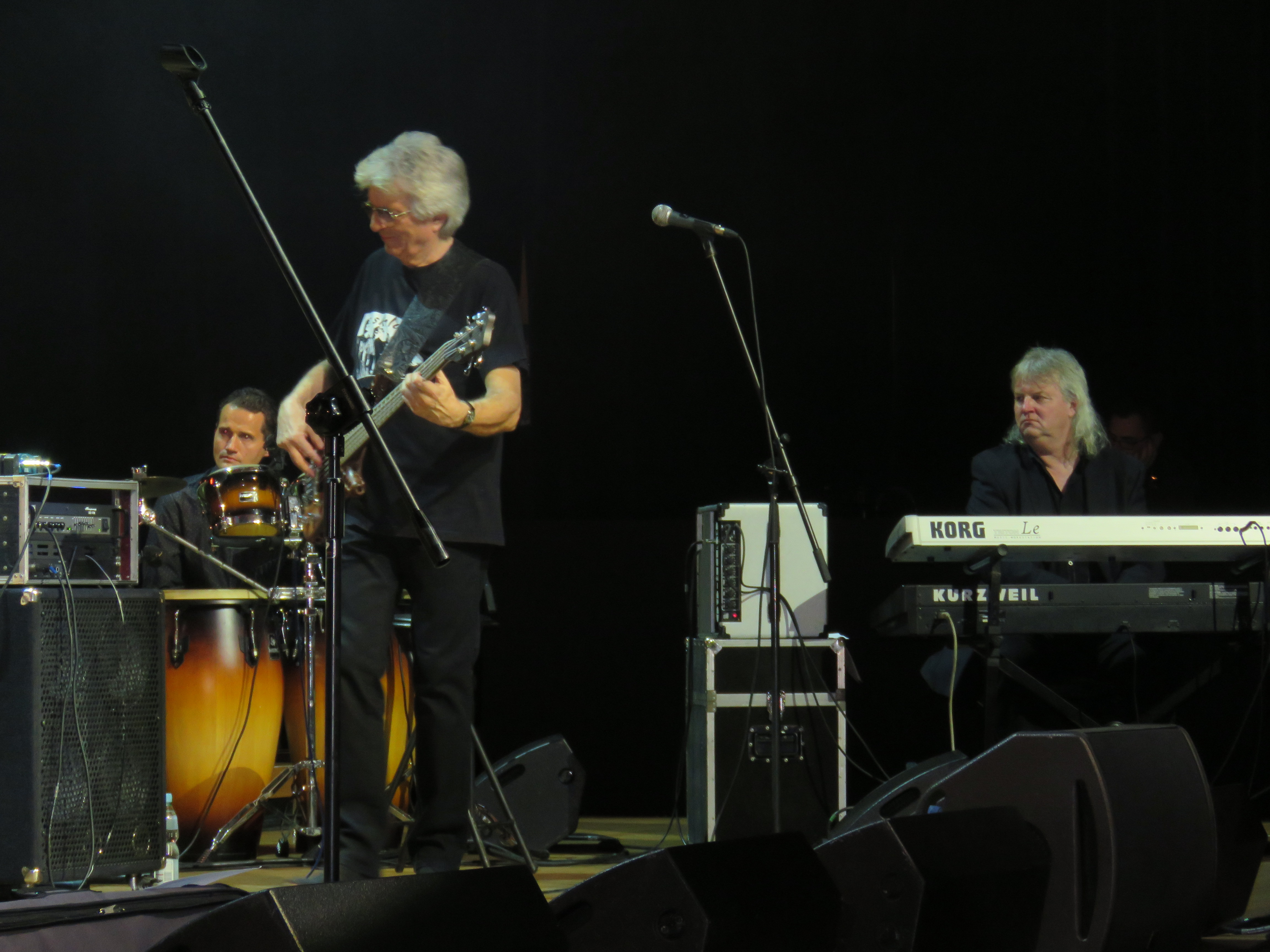 Skaldowie: Konrad Ratynski, Grzegorz Gorkiewicz.